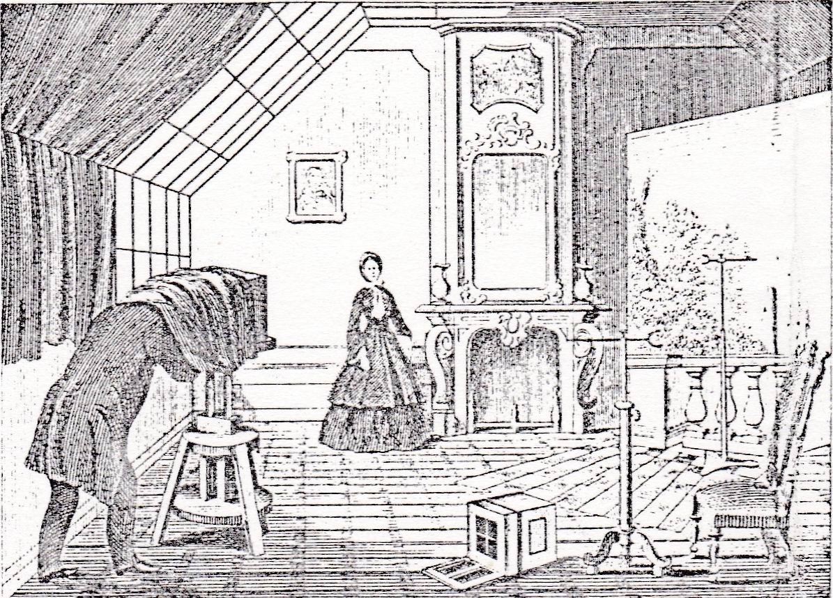 Fotoatelier um 1869. Aus: Otto Bühler, Atelier und Apparat des Photographen, Weimar 1869, Tafel II., fig.2